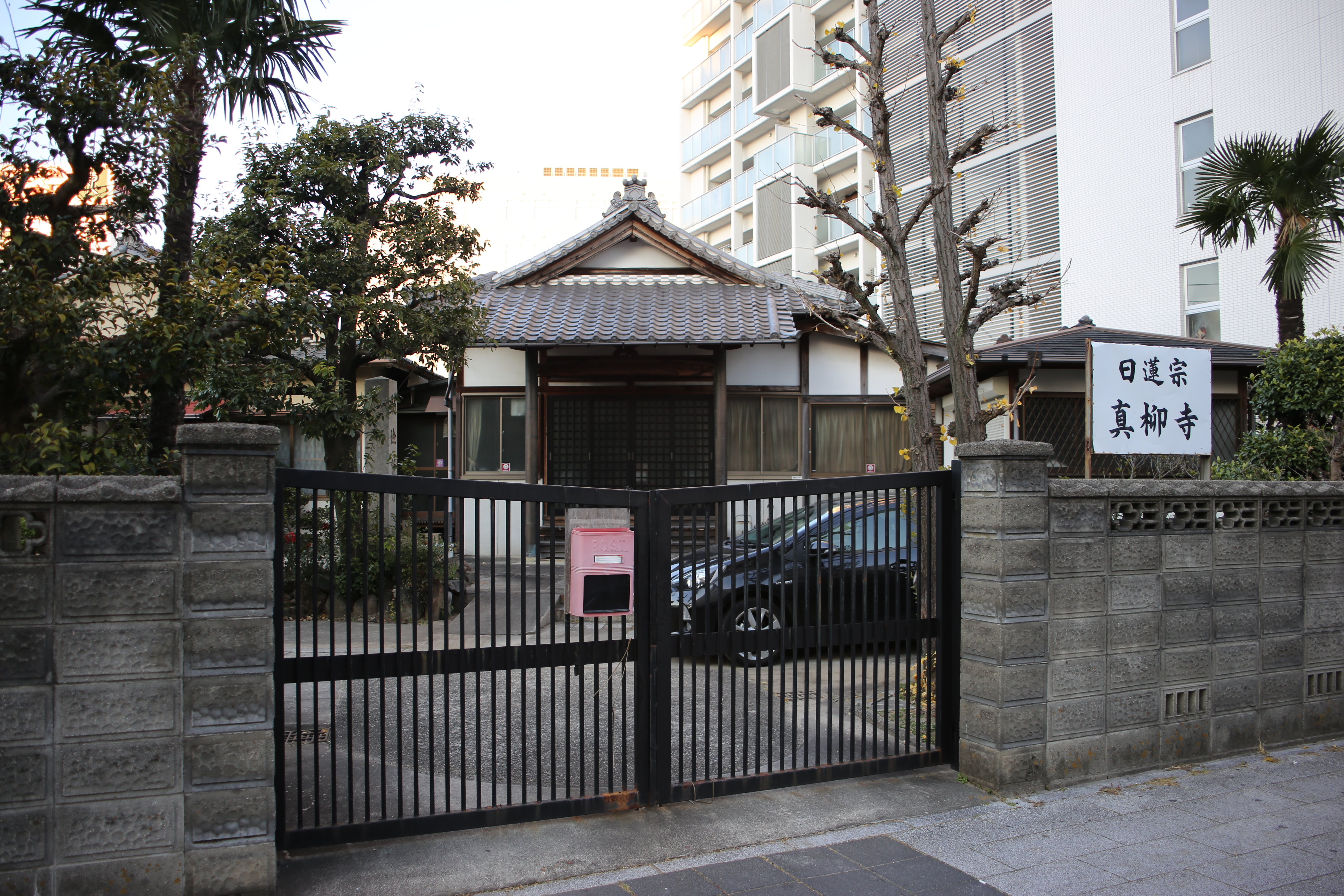 名古屋市東区東桜の眞柳寺